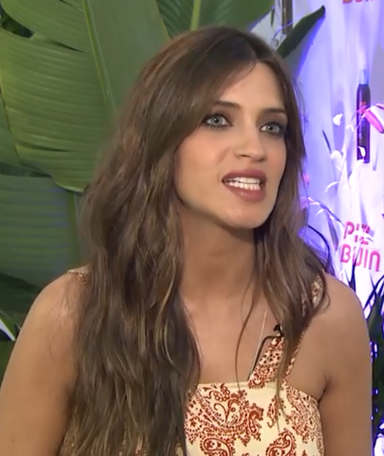 Sara Carbonero, que atraviesa su mejor momento personal, ha lucido un maravilloso bronceado en la presentación de Protect & Cool, el nuevo protector solar de Piz Buin, marca de la que Sara es embajadora para España y Portugal. La periodista se preocupa por mantener su piel protegida y con un bonito bronceado durante todo el año, incorporando a sus rituales de belleza la aplicación de los productos Piz Buin.